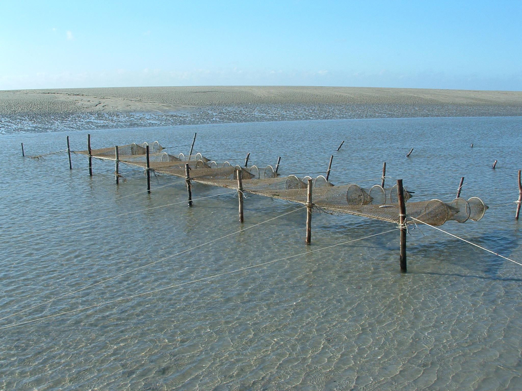 Pêcherie dans la baie du Mont Saint Michel